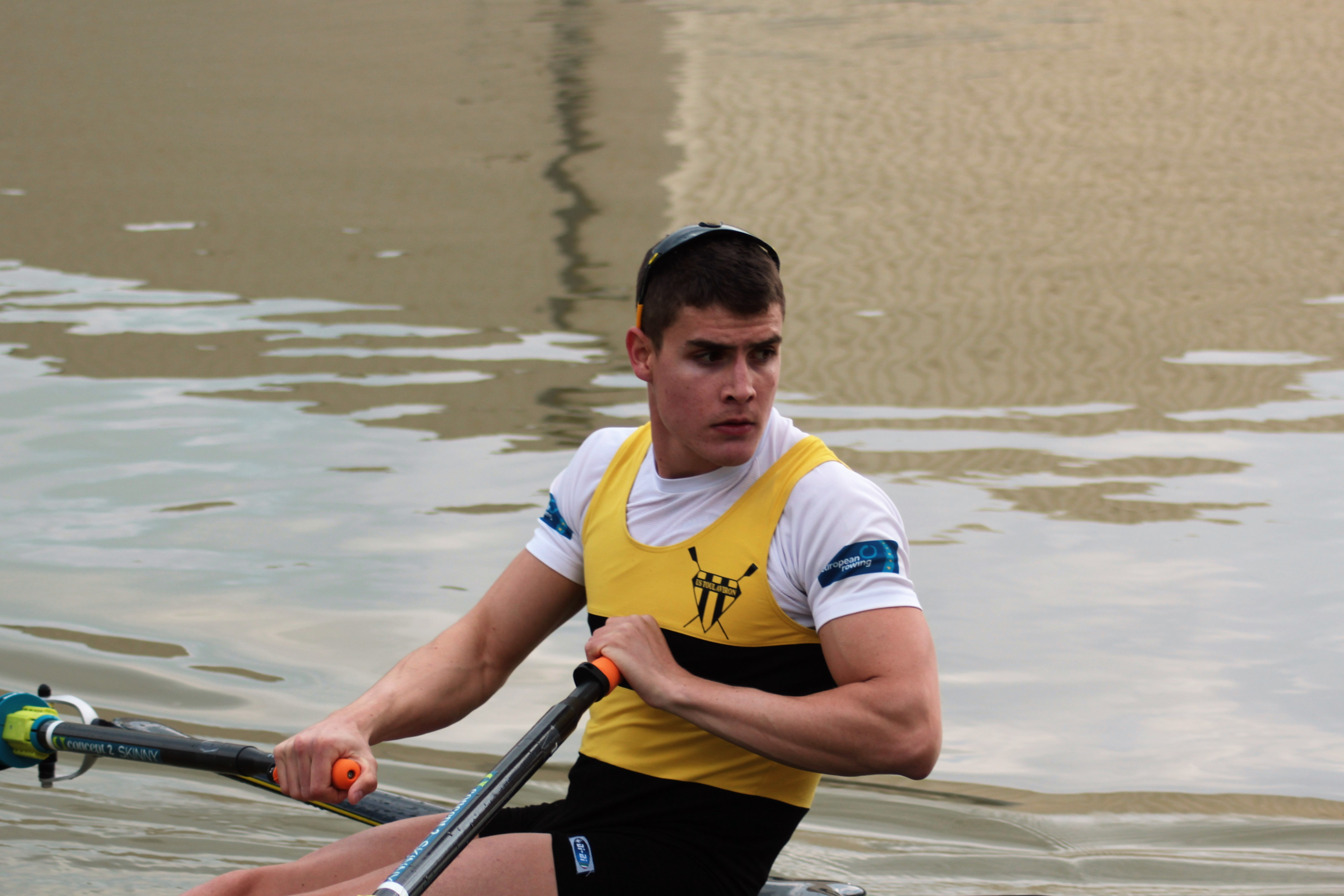 Pierre Houin Championnat de France Cazaubon 2016